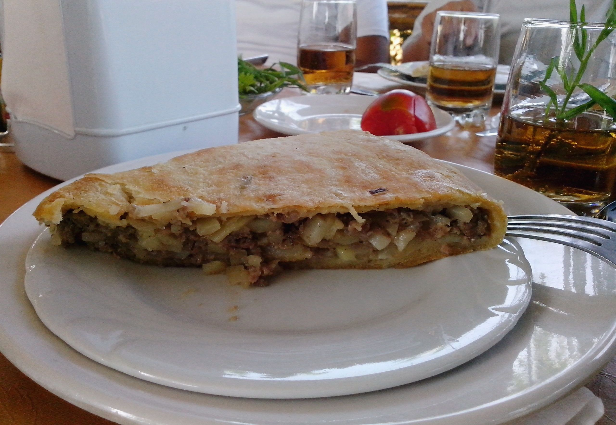 Qusar